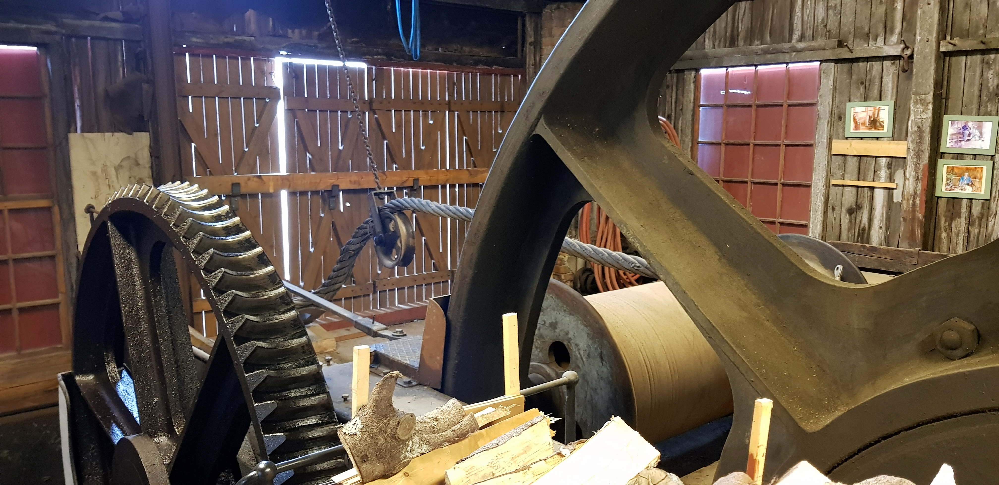 Det renoverade ångslipspelet vid Gävle Varv den 10 juni 2019